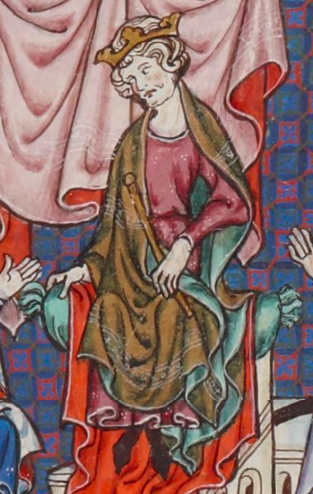 Jakub II. Aragonský